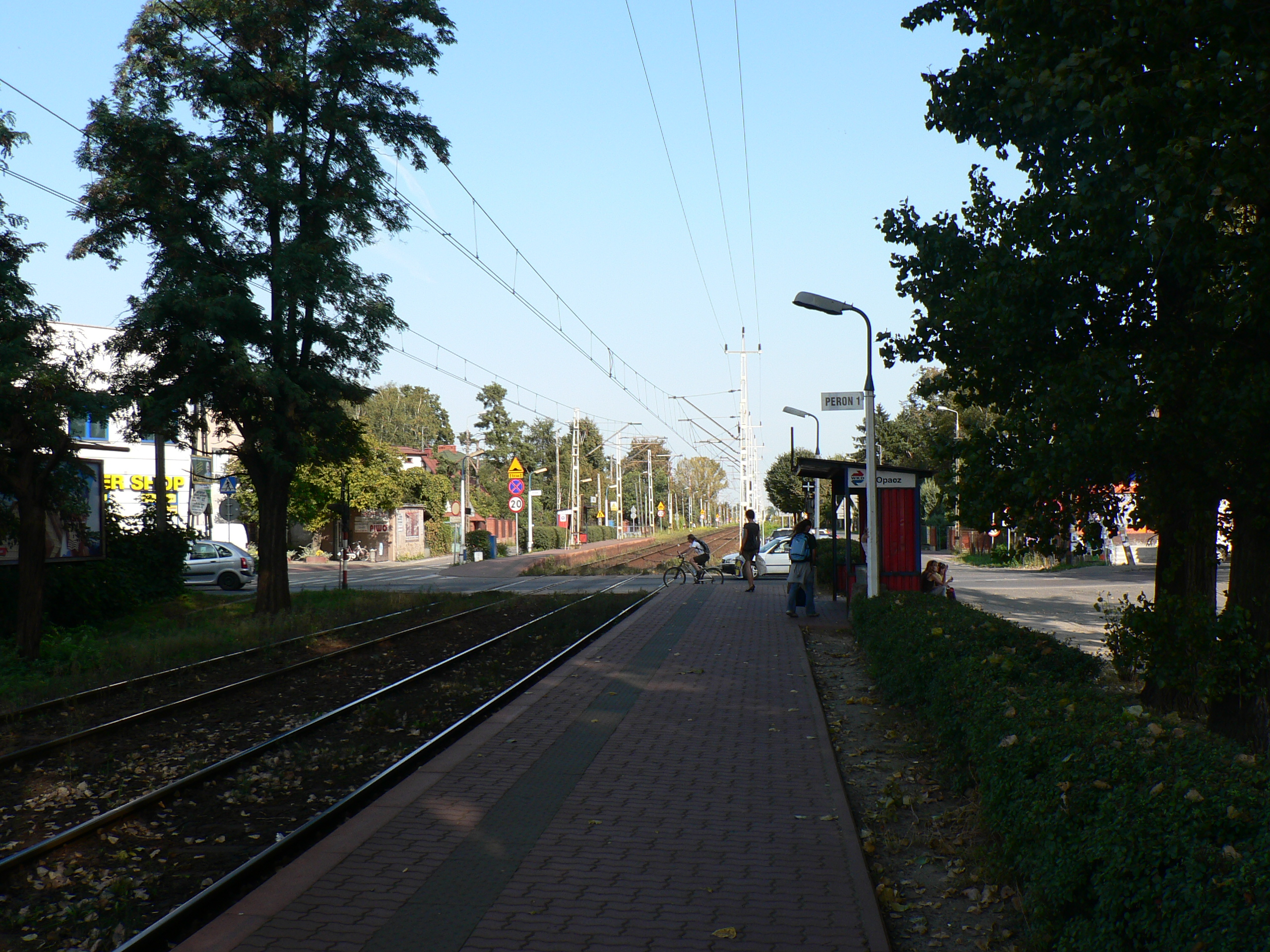 Stacja WKD Opacz